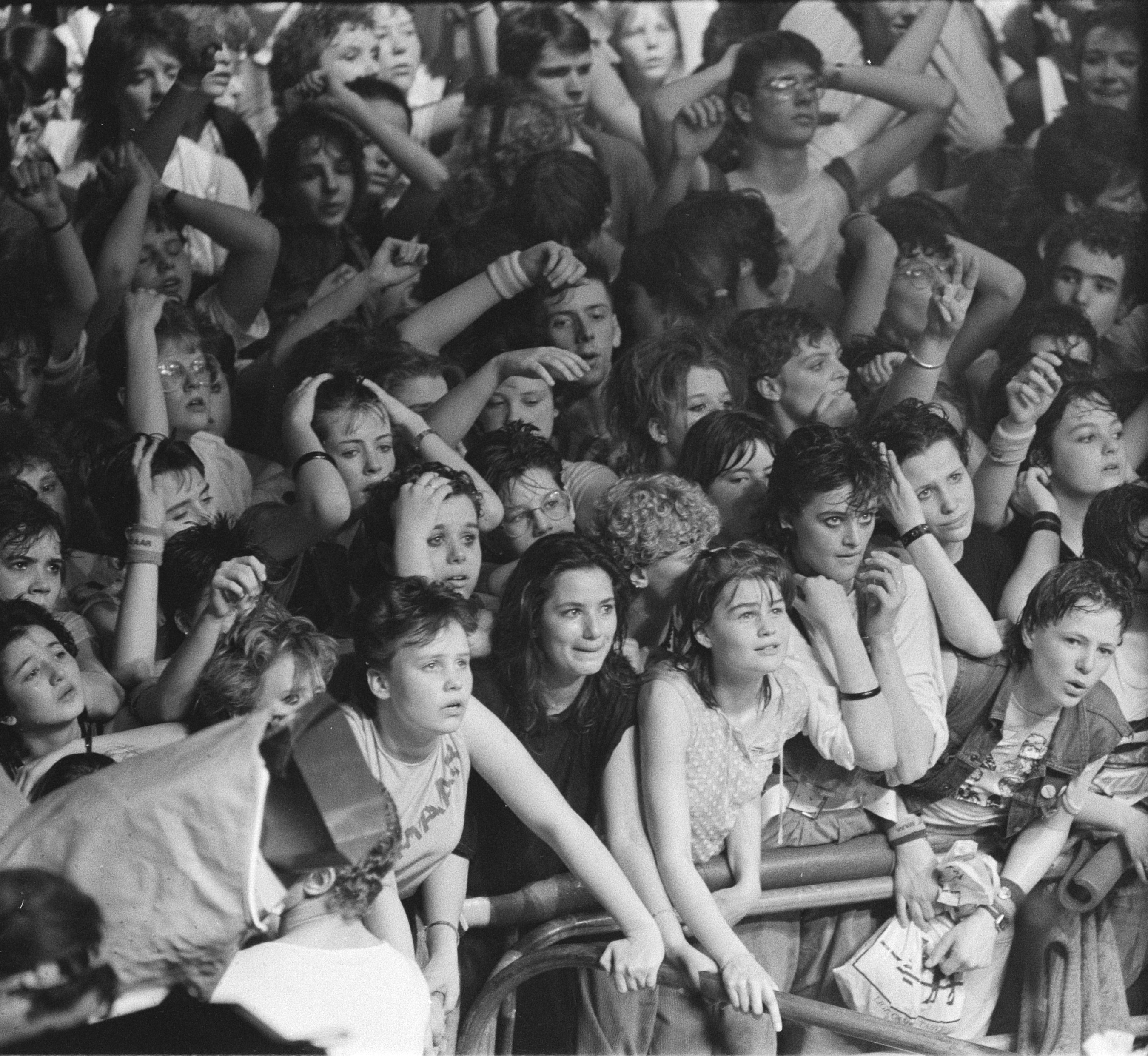 Collectie / Archief : Fotocollectie Anefo Reportage / Serie : [ onbekend ] Beschrijving : Afscheidsconcert van "Doe Maar" in Den Bosch ; hoog opgelopen emoties bij fans Datum : 14 april 1984 Locatie : Den Bosch Trefwoorden : FANS, afscheid, concerten, popgroepen Fotograaf : Bogaerts, Rob / Anefo Auteursrechthebbende : Nationaal Archief Materiaalsoort : Negatief (zwart/wit) Nummer archiefinventaris : bekijk toegang 2.24.01.05 Bestanddeelnummer : 932-9334